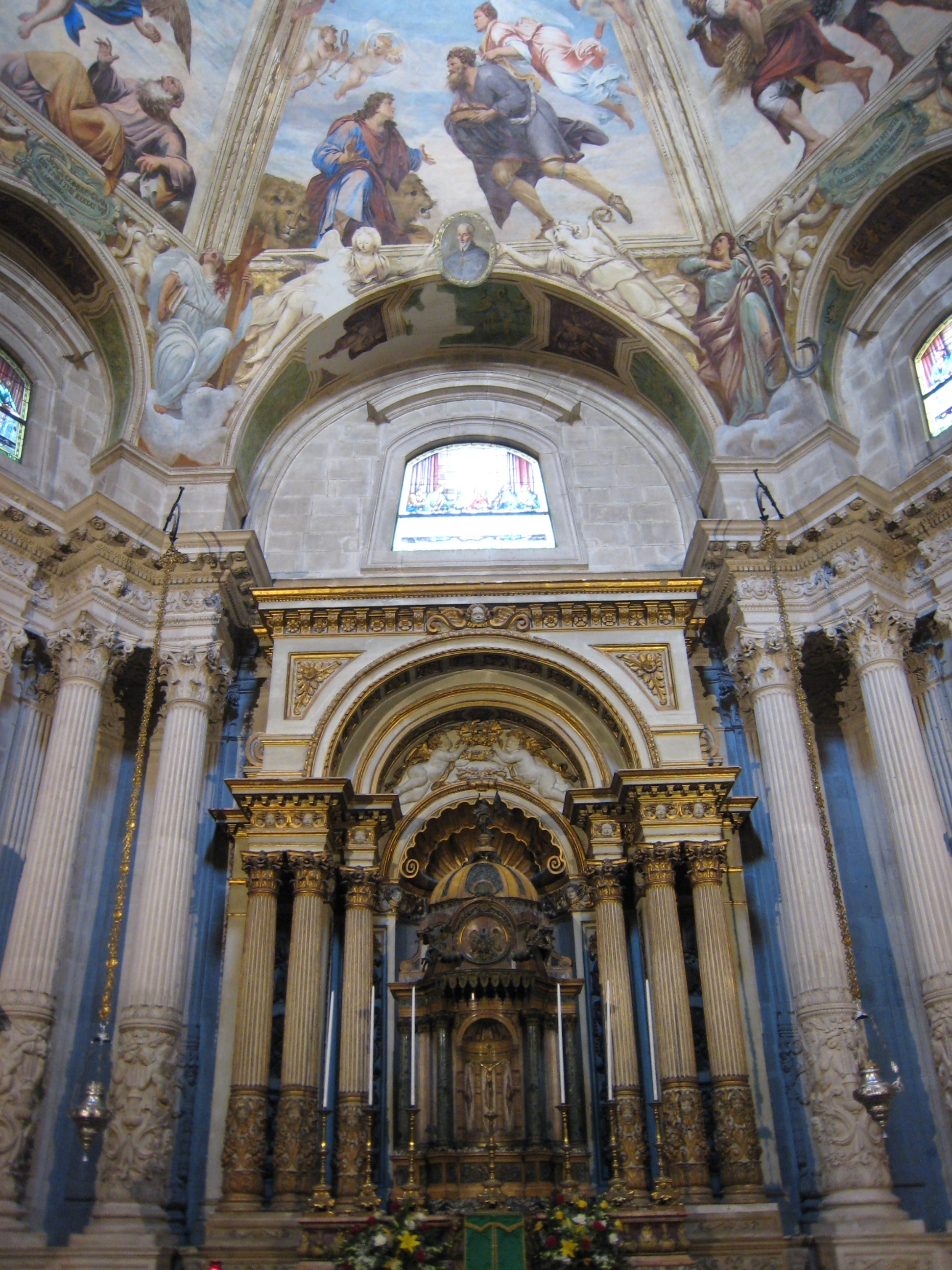 Duomo di Siracusa - altare maggiore della Cappella del Santissimo Sacramento"; opera di Luigi Vanvitelli, affreschi di Agostino Scilla.